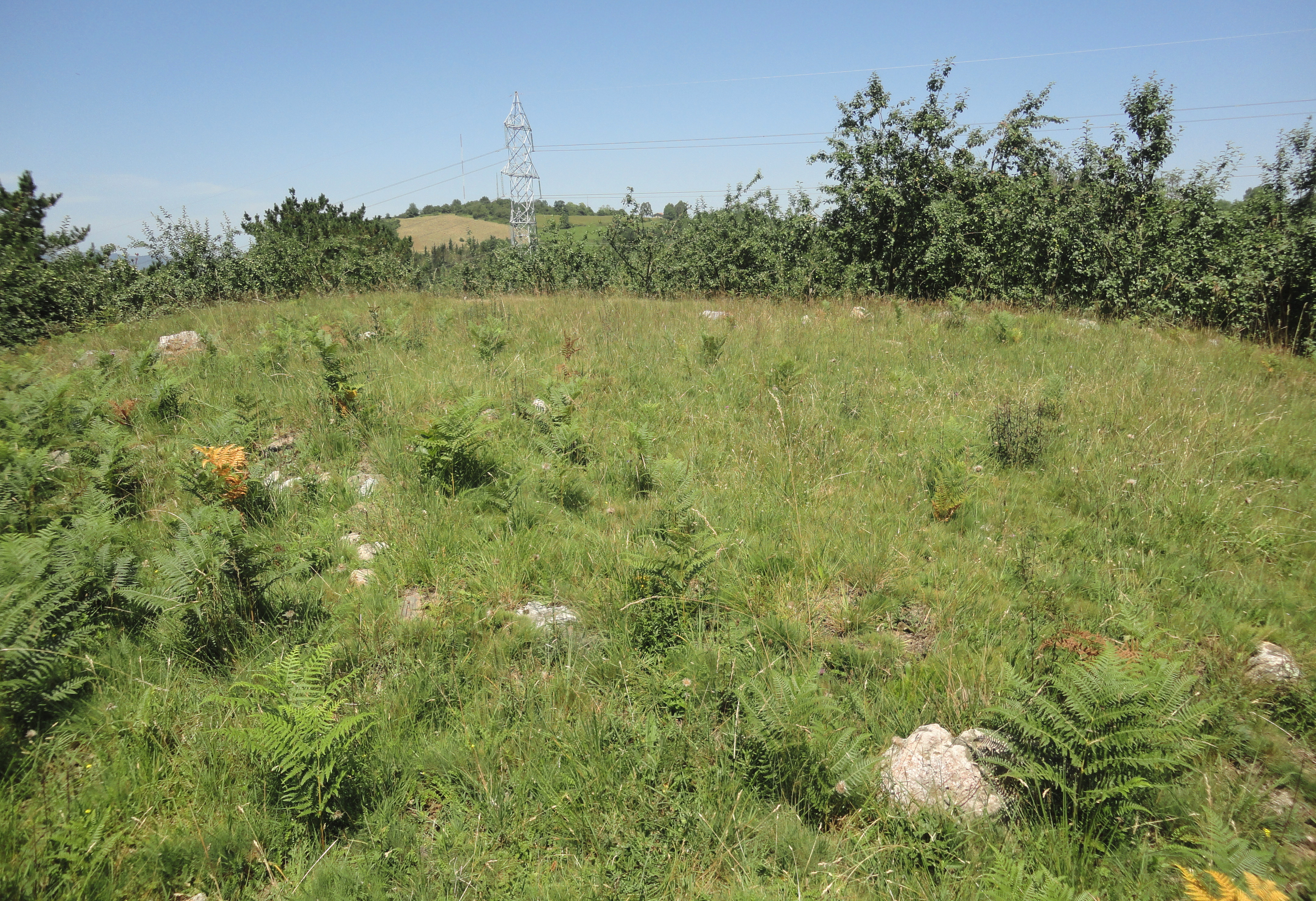 Ermañalde harrespilak 1-2